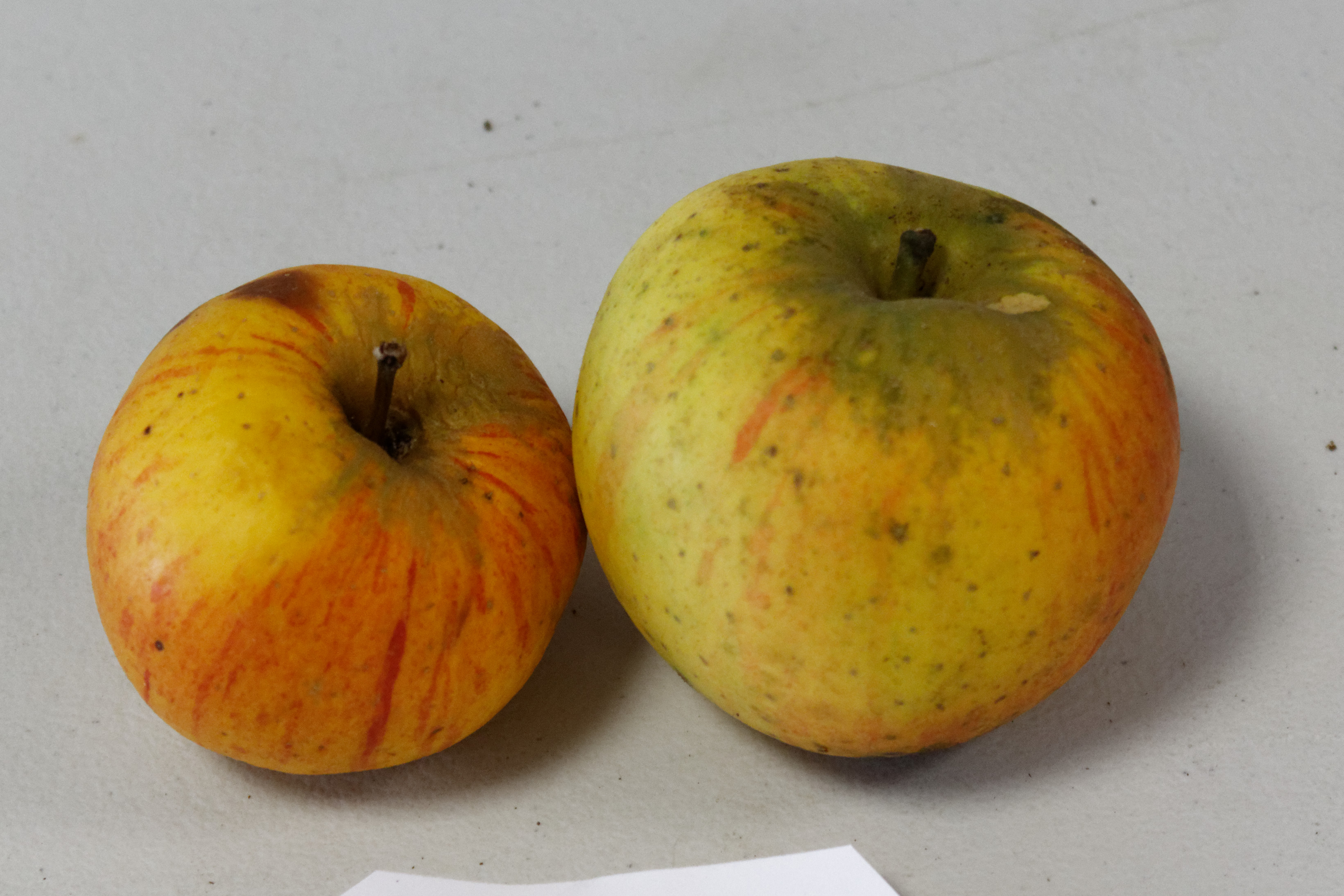 Pomme photographiée à l'OPL Peillac/Les Fougerêts.